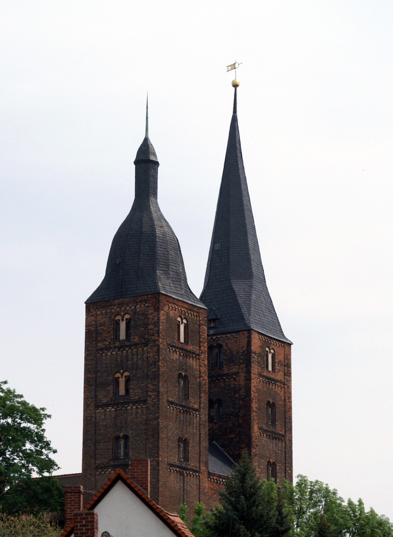 Rote Spitzen (red spires) in Altenburg, Germany